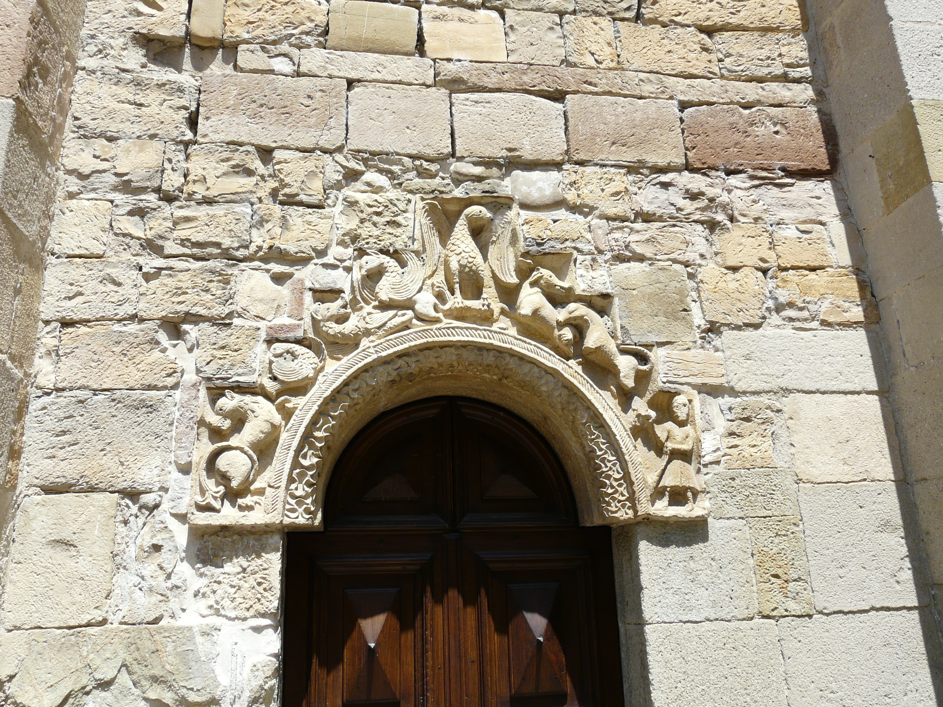 Chiesa dell'Assunzione di Maria Vergine, Fornovo di Taro, Emilia-Romagna, Italia